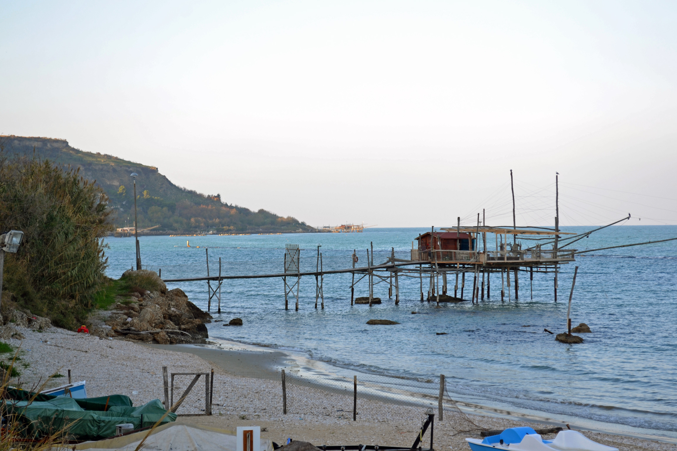 Fossacesia Marina, Abruzzo, Italia